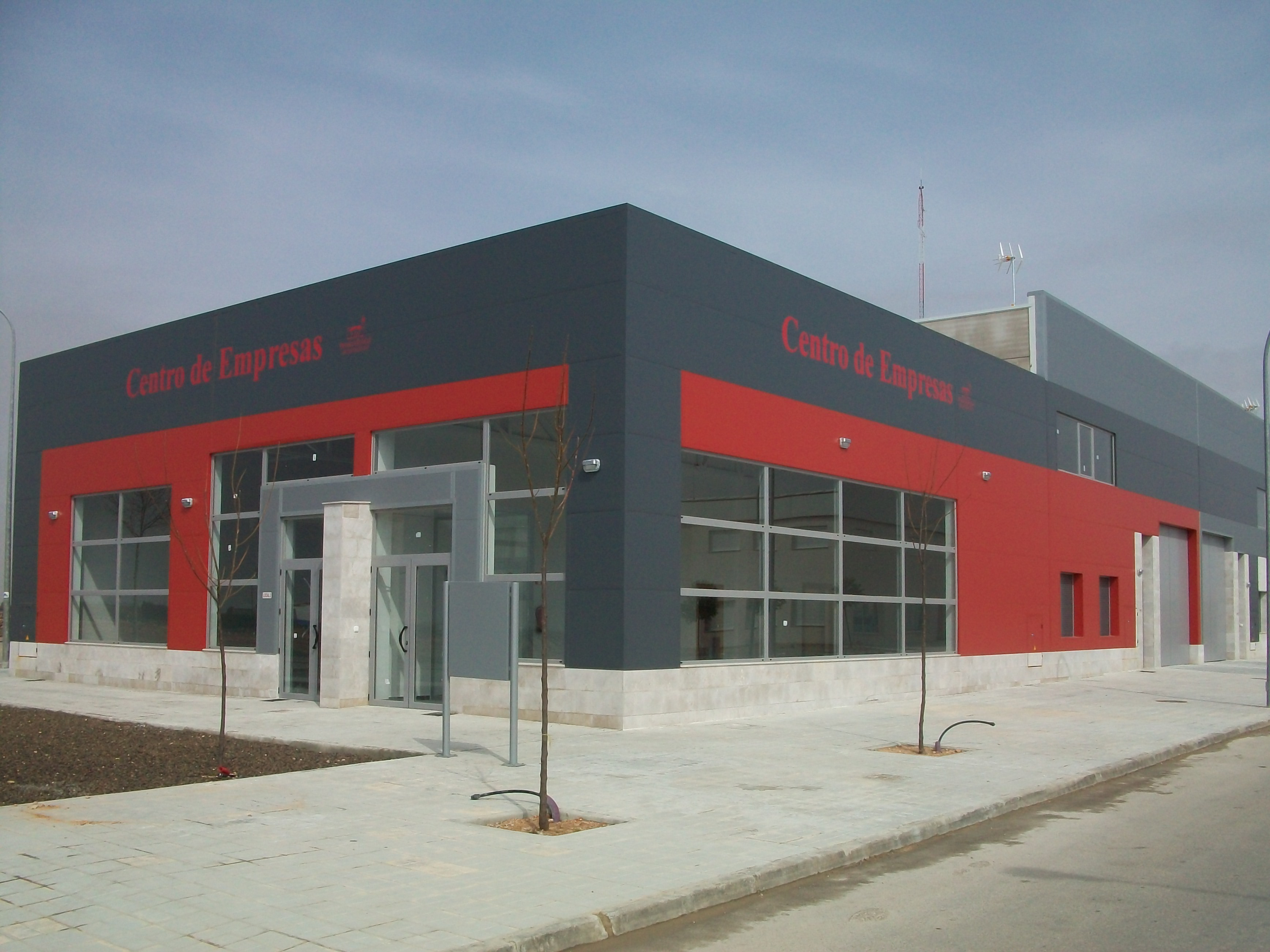 Vivero de empresas en Pedro Muñoz (Ciudad Real).